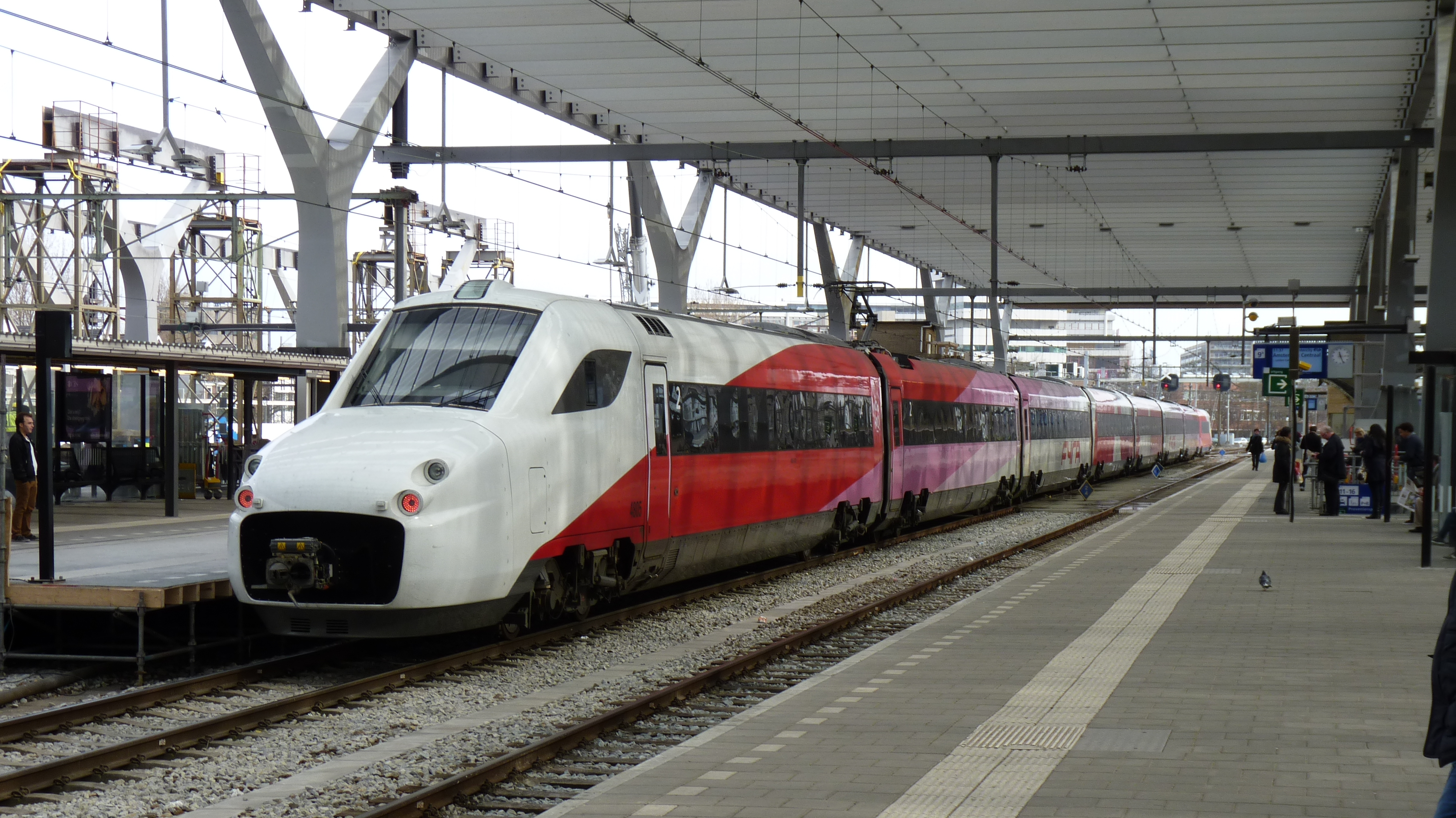 Treinstel 4806, een Fyra V250, staat klaar voor vertrek op station Rotterdam Centraal.